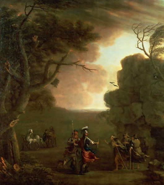 detail